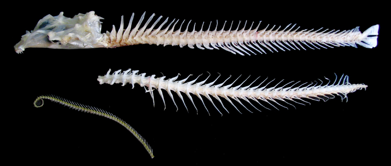 Crâne et colonne vertébrale d'un hémitriptère atlantique (en haut) et les squelettes de deux proies partiellement digérées retrouvées dans son estomac (en bas). La longueur du morceau d'en haut est de moins de 25cm. La plus petite des proies pourrait être un lançon... Photo prise par Matthieu Godbout, photographe et poissonnier, aux Îles-de-la-Madeleine depuis 2004.